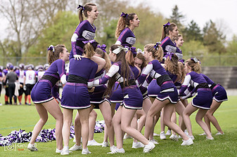 Gladiators Pearls beim Anfeuern der Gladiators beider Basler